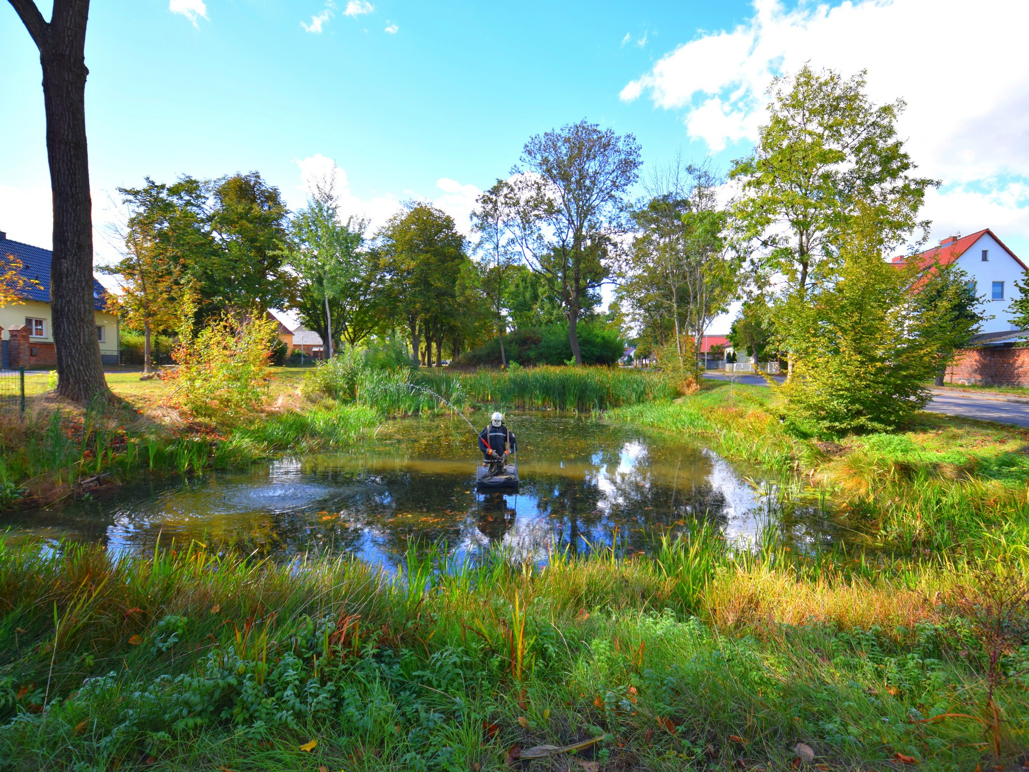 Östlicher Teich, Frankfurt (Oder)-Hohenwalde